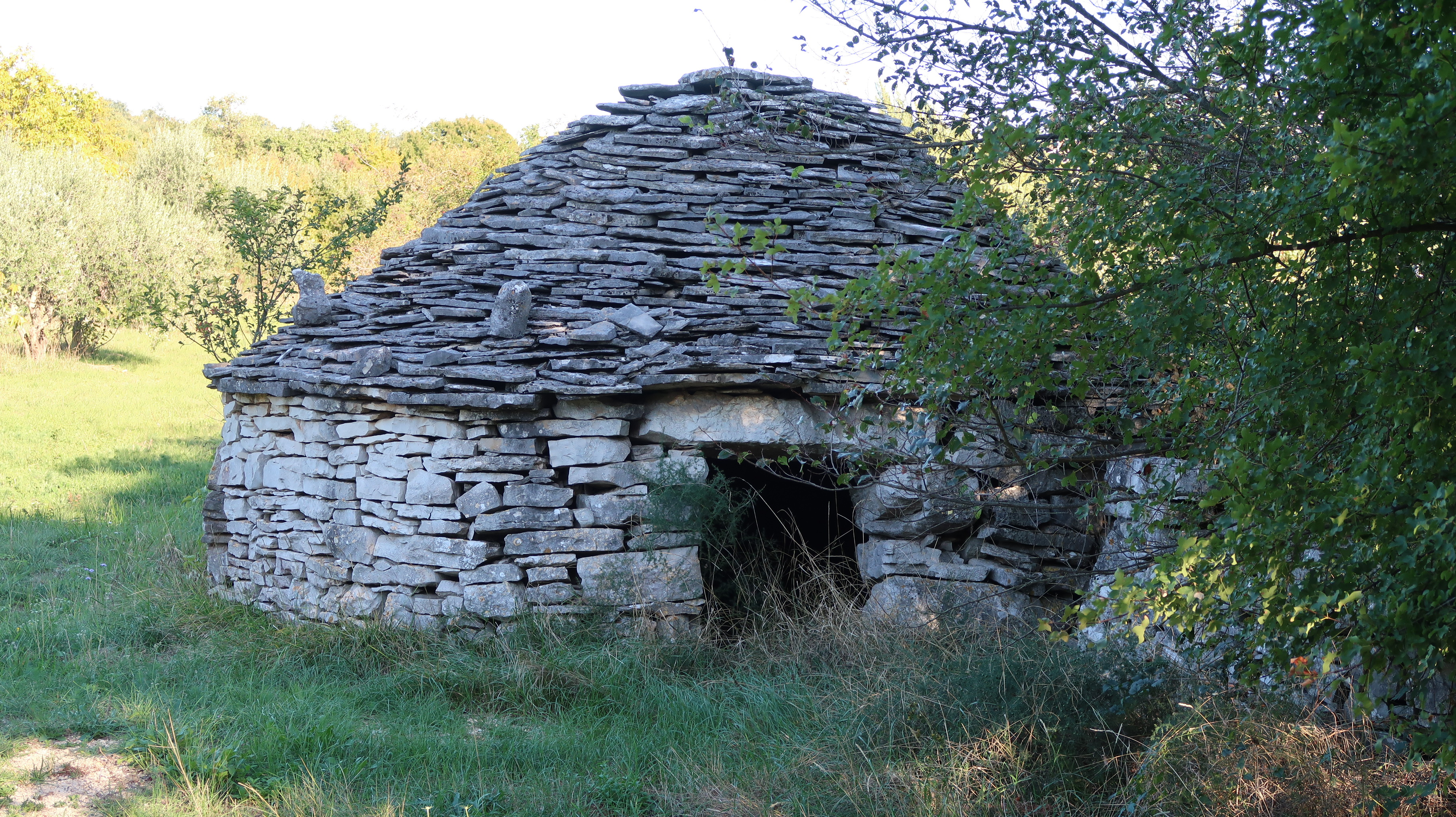 Kroatien (HR) - Gespanschaft Istrien (036) - Kanfanar: Kažun (III), südlich der A8